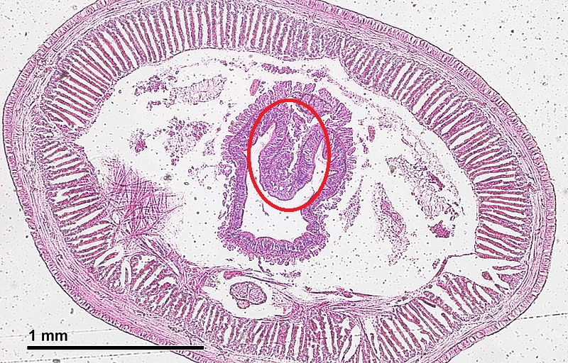 Corte transversal de oligochaeta com tiflossole marcada